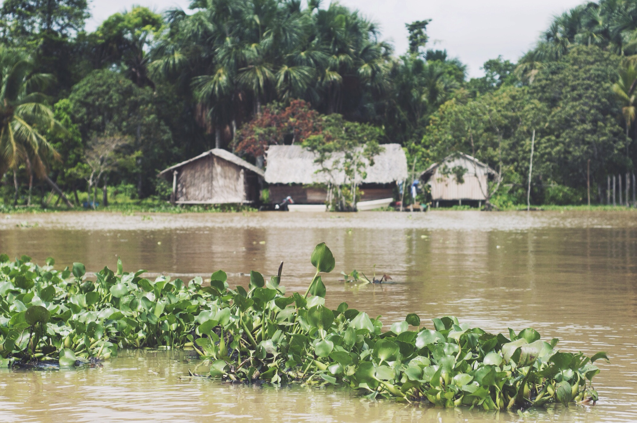 Delta de Orinoco